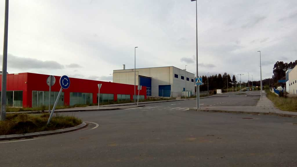 Parque empresarial A Trabe.